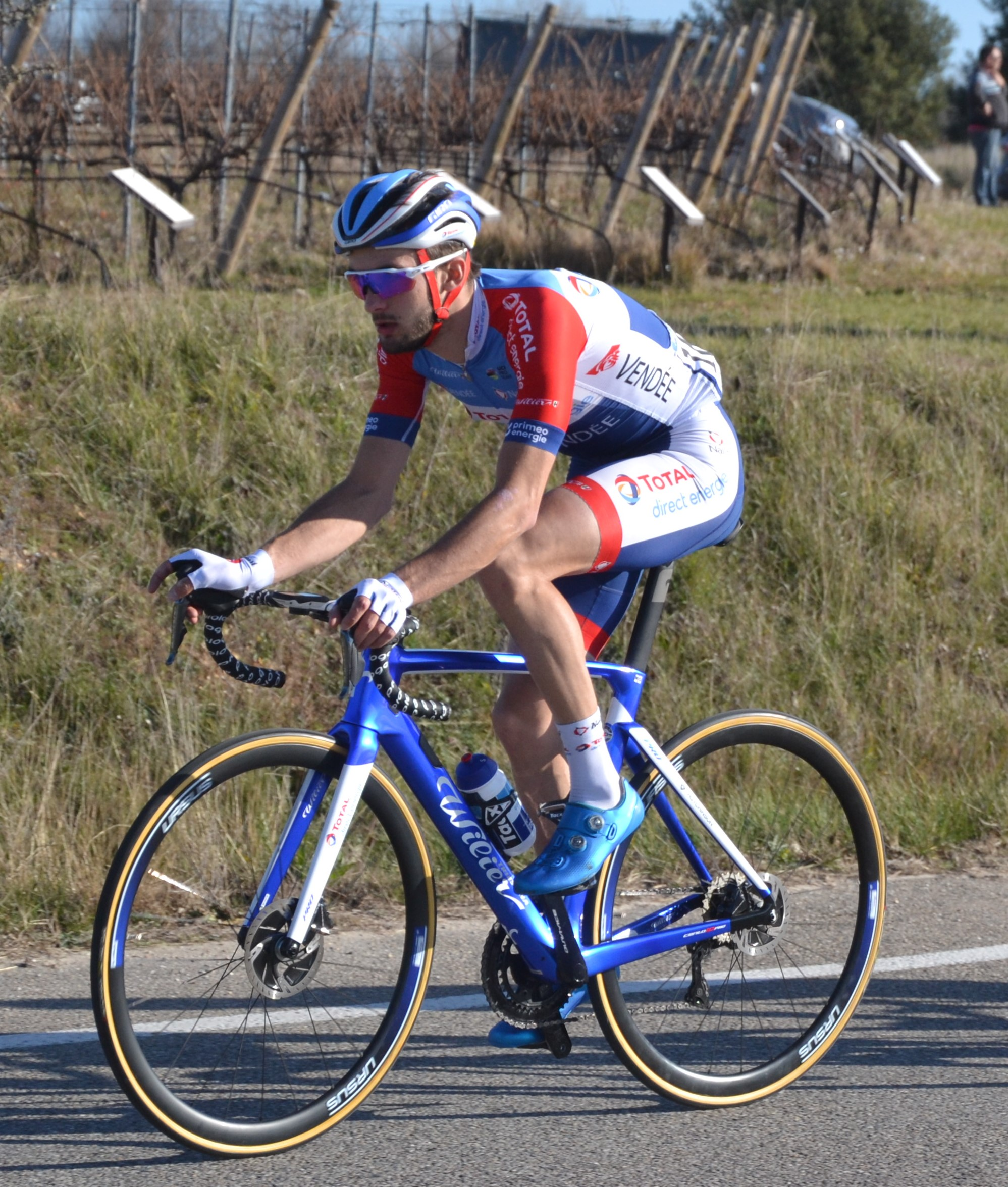 au rond point avant l'entrée de Bédoin